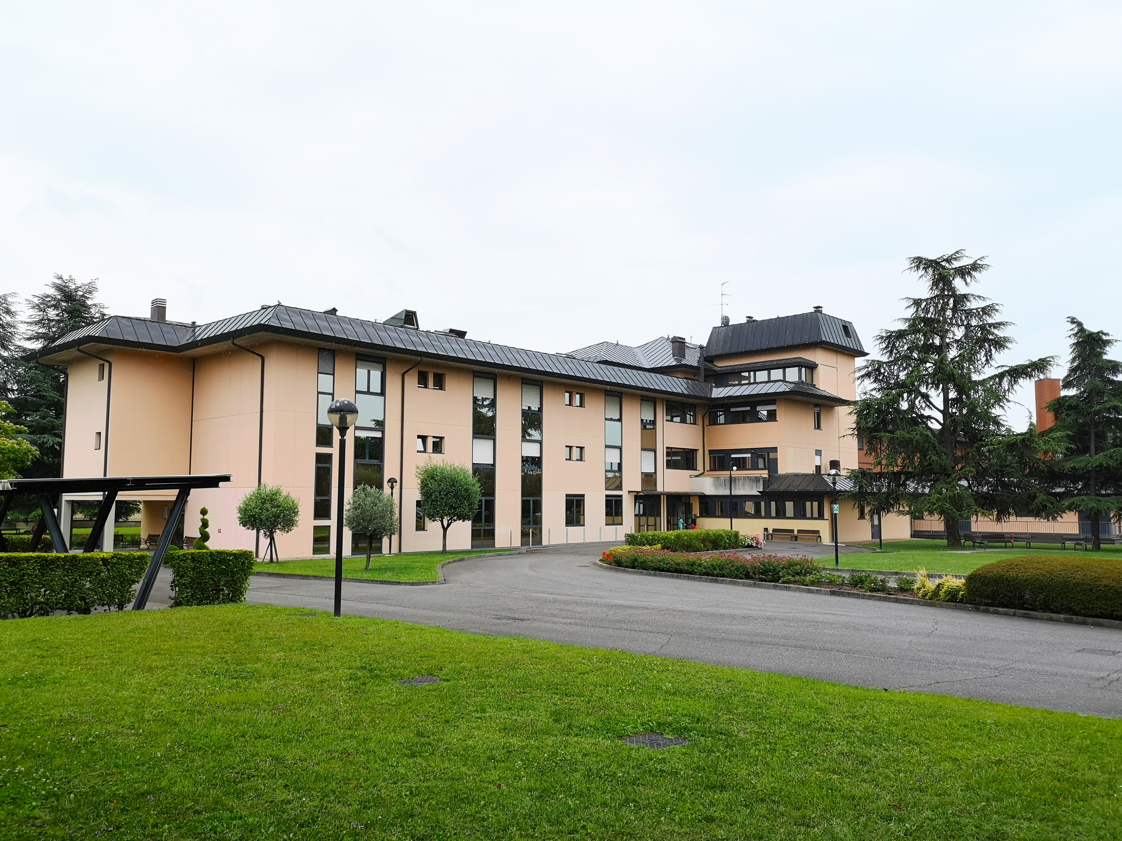 Casa di Riposo Don Angelo Colombo, Travagliato